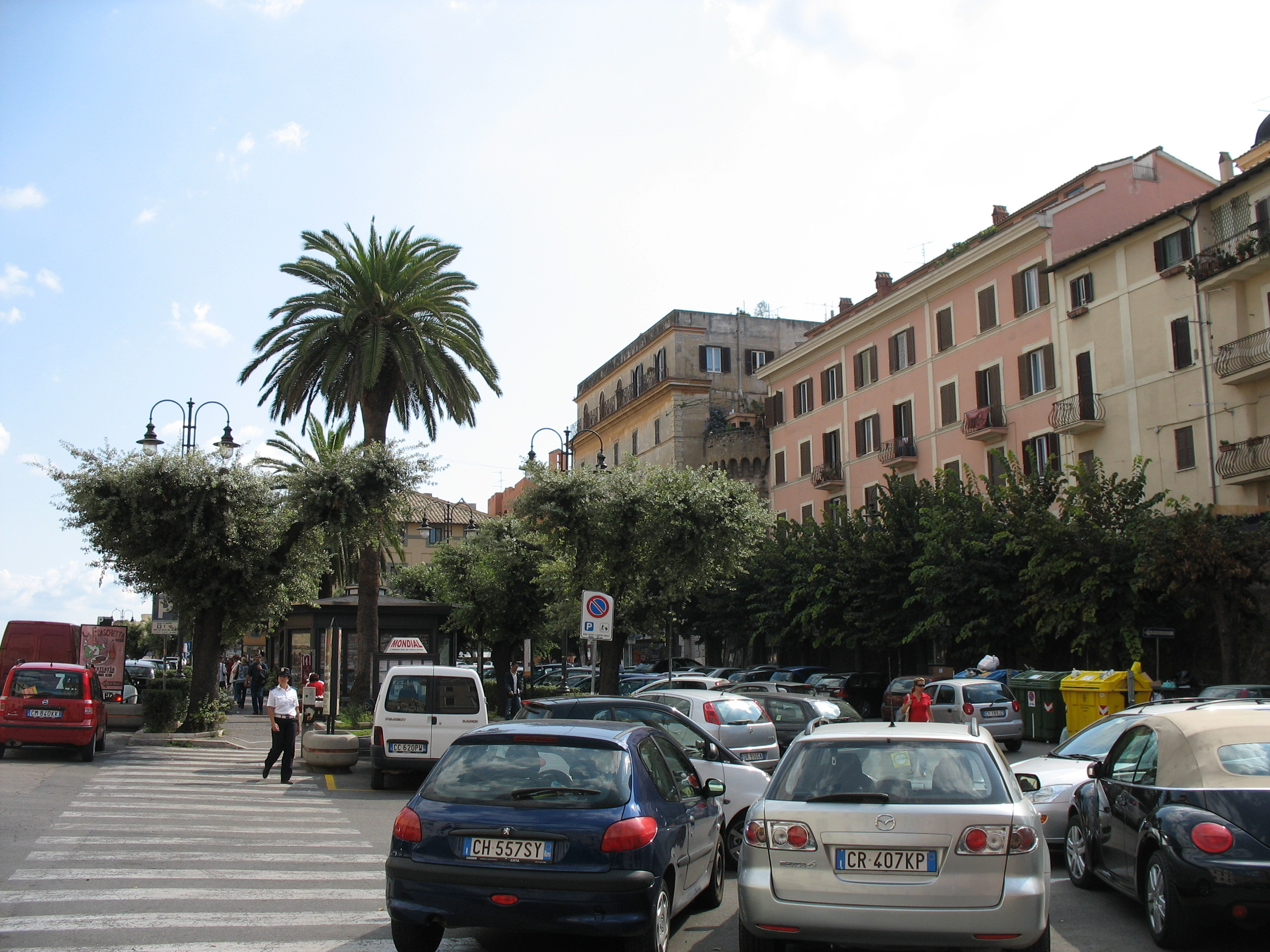 Piazza Giuseppe Mazzini, Nettuno (RM)